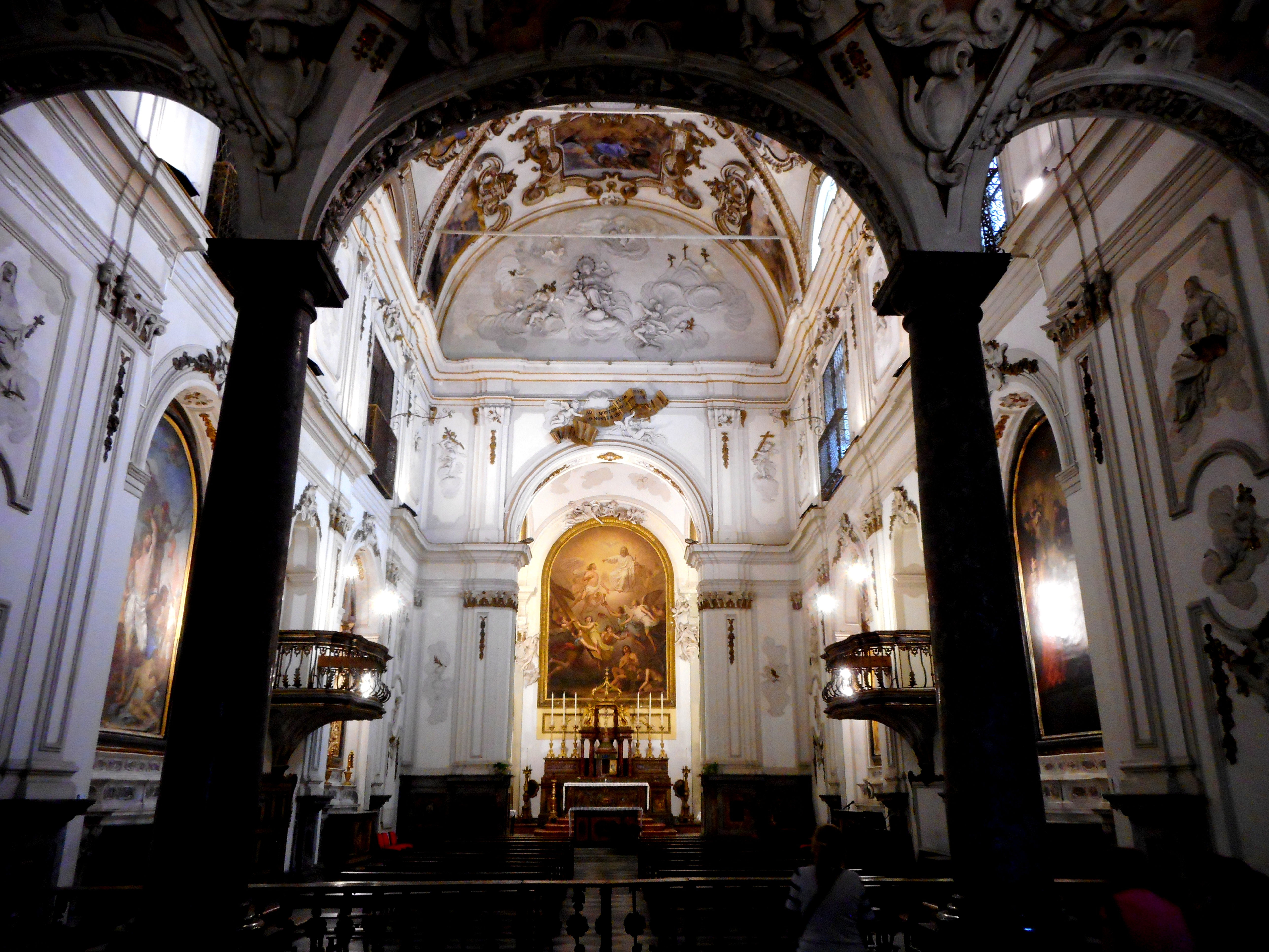 Interno della chiesa di Santa Maria di Monte Oliveto detta la Badia Nuova